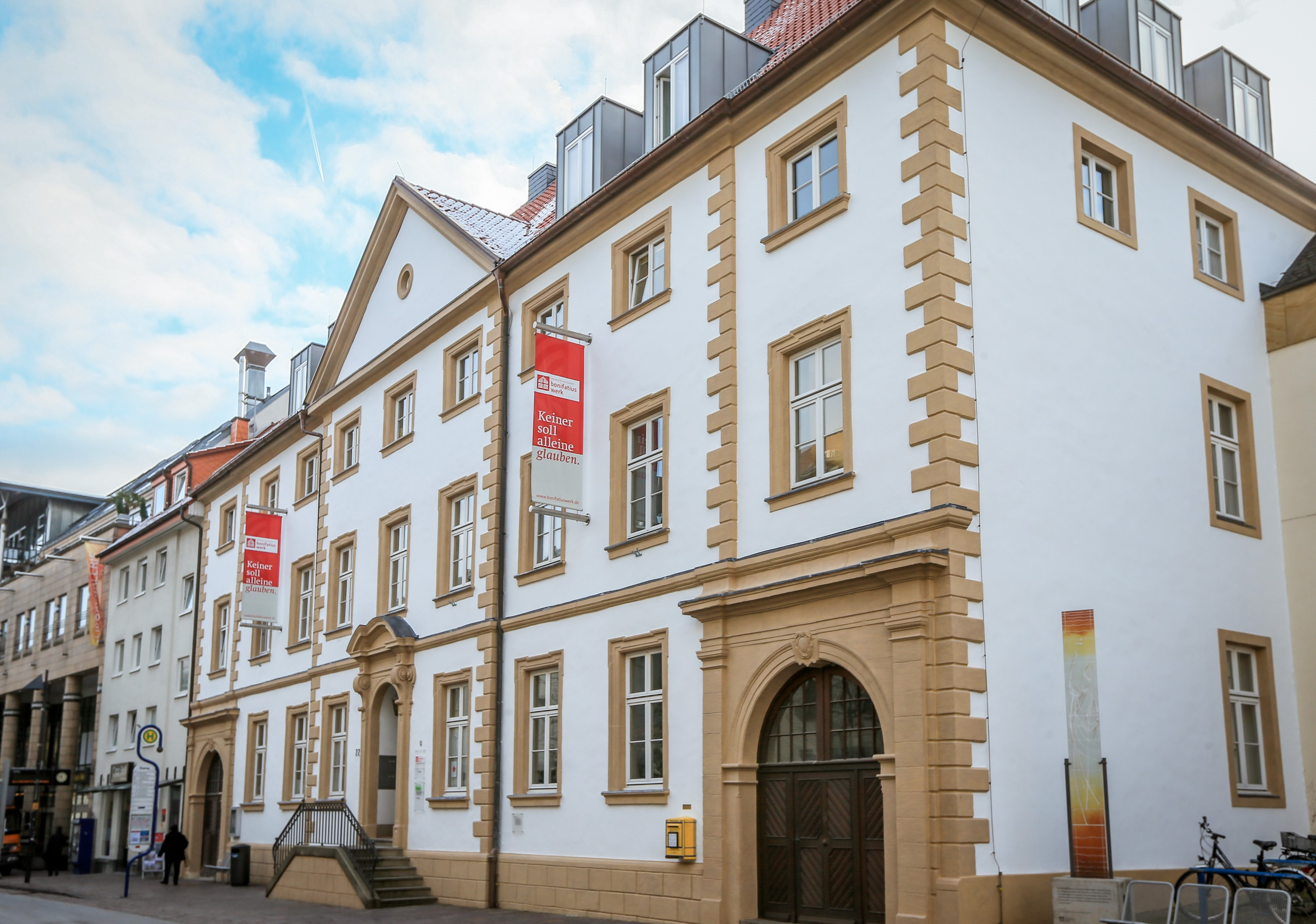 Der ehemalige Posthof in Paderborn, der Sitz des Bonifatiuswerkes. Zuketzt wurde das Bonifatiushaus im Jahr 2016 grundlegend saniert.